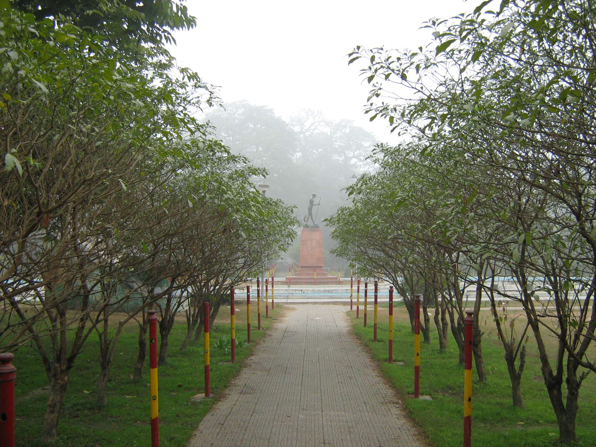 Maharaja Ranjith Singh Garden Amrithsar